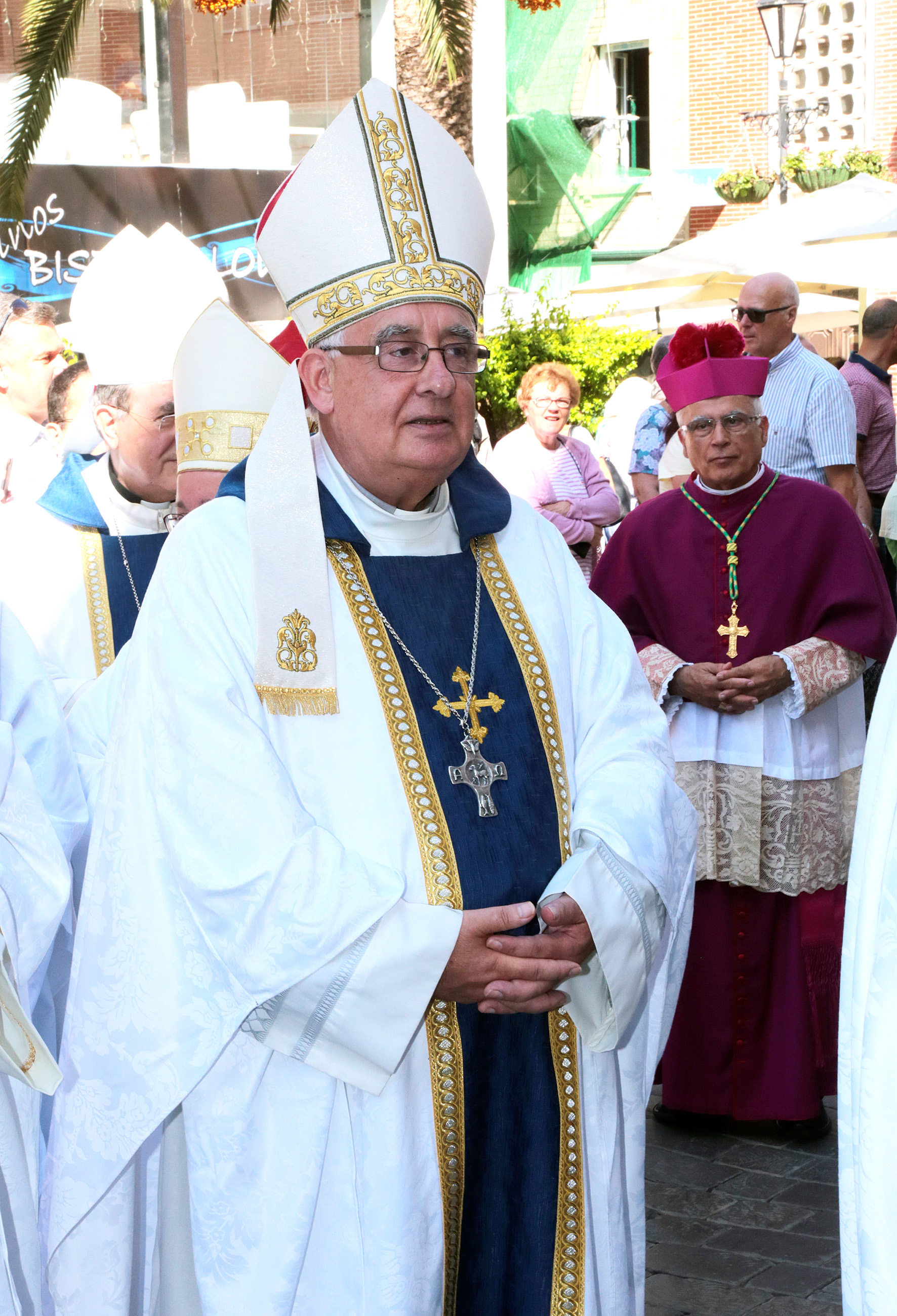 24-Sep-2016 Toma de posesión de Carmelo Zammit del cargo de Obispo de Gibraltar en la Catedral católica de Santa María la Coronada. Tras la procesión de obispos y sacerdotes por la Calle Real hasta una Catedral abarrotada con las puertas totalmente abiertas (no cerradas, como era costumbre) allí se encontró con el Obispo Heskett, administrador apostólico y el rector de la Catedral, Monseñor Paul Bear. A la ceremonia de toma de posesión y eucaristía asistieron, entre otros, el Ministro Principal de Gibraltar, Fabián Picardo, y el Gobernador de Gibraltar, Ed Davis. Además, asistió en representación del gobierno maltés el Ministro Stefan Buontempo, ya que en Malta fue ordenado Zammit Obispo de Gibraltar. Otras personalidades en el evento: Daniel Feetham, líder de la oposición parlamentaria, el portavoz del Parlamento y Alcalde de Gibraltar,Adolfo Canepa, el Viceministro Principal, Joseph García, el Ministro Joe Bossano y el ex Ministro Principal, Peter Caruana